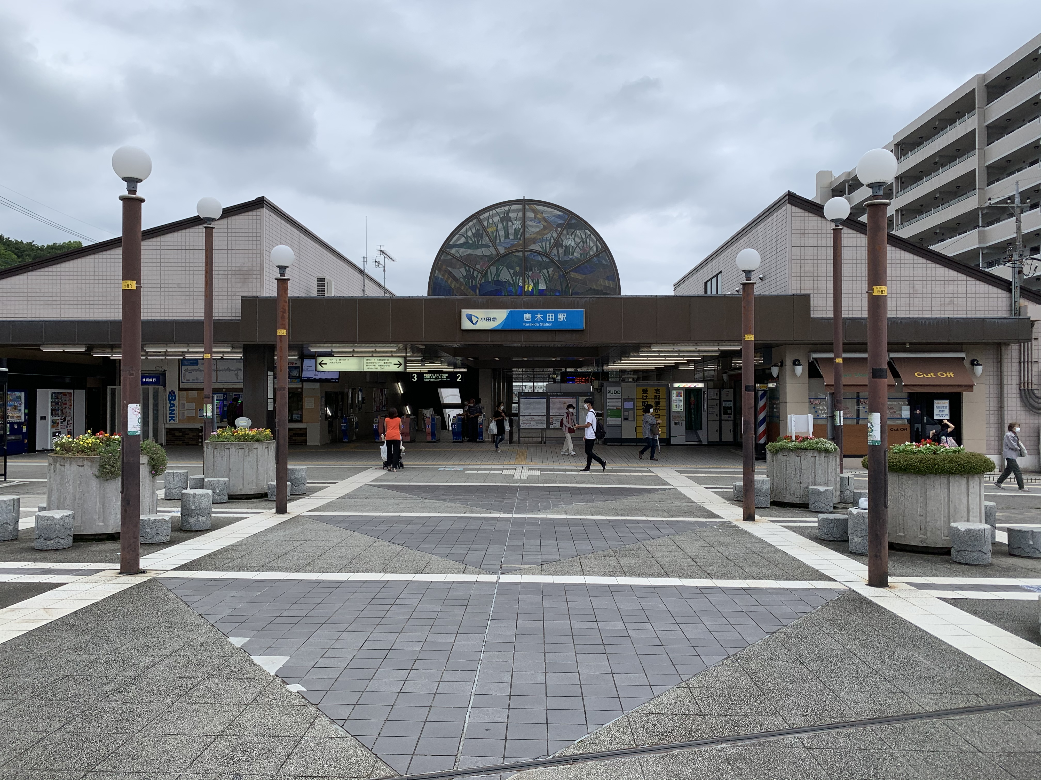 唐木田駅(2020年6月24日撮影)